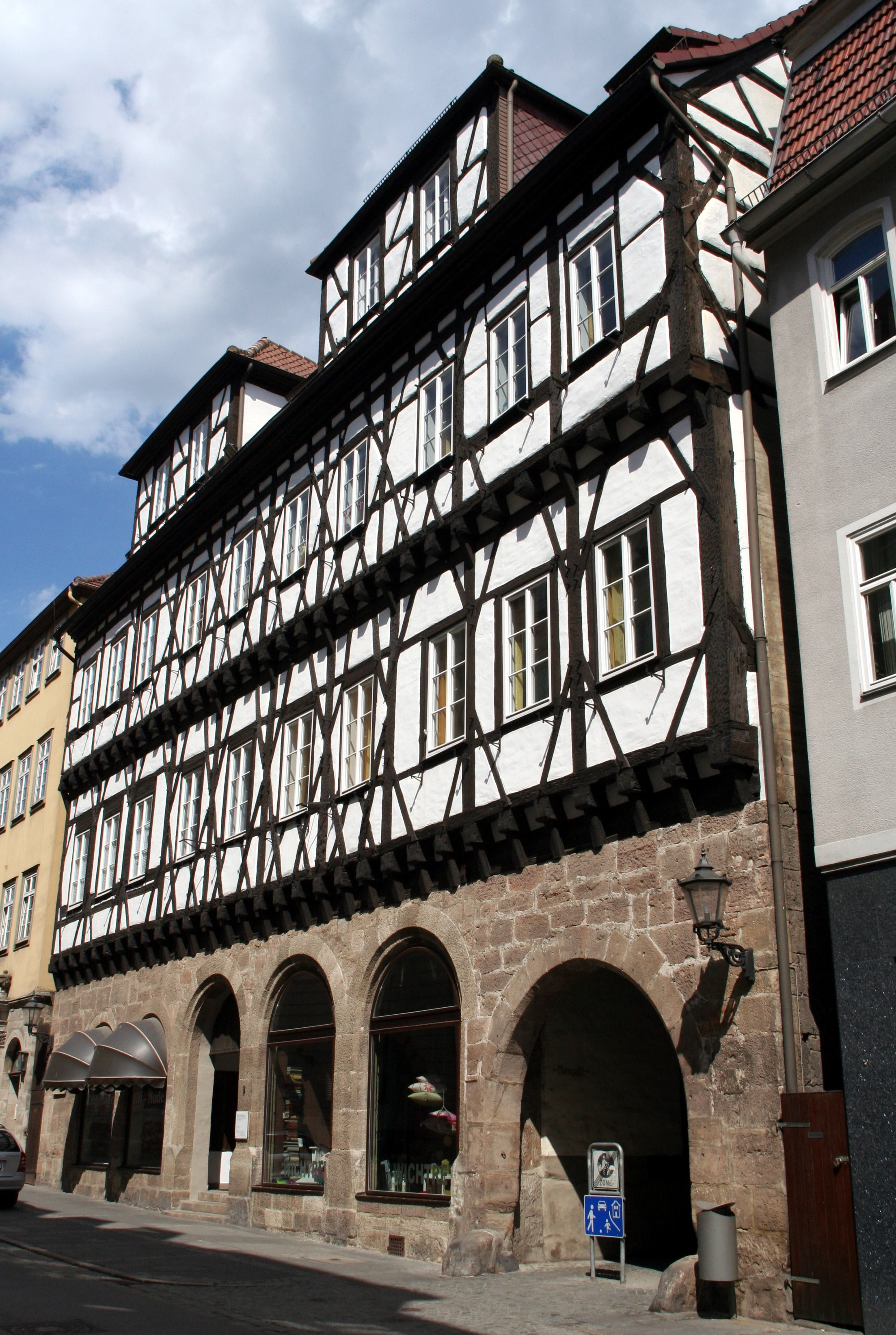 Ketschengasse 7 in Coburg